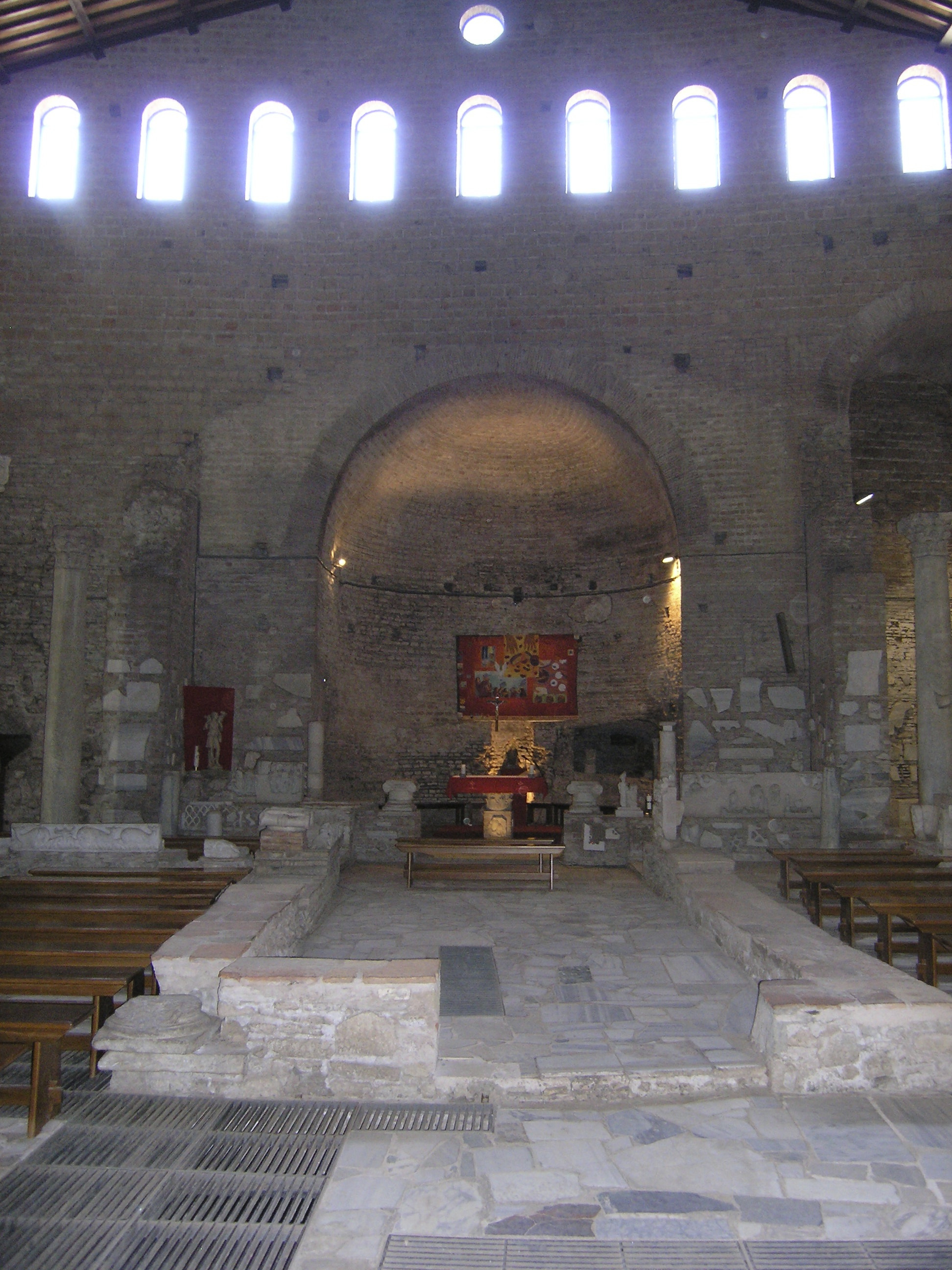 Domitilla-Katakomben in Rom; Hauptkirche.